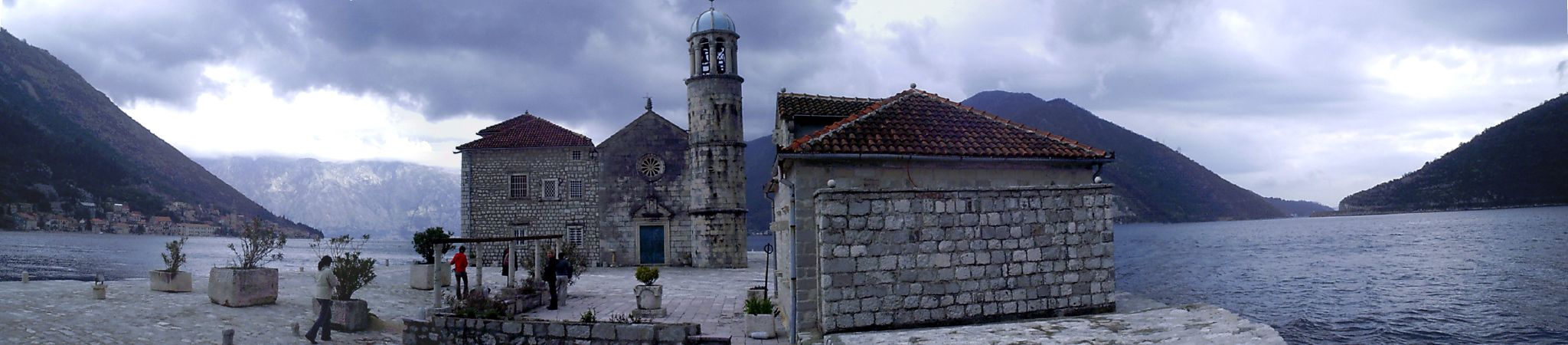 Perast, MontenegroPerast - Isla